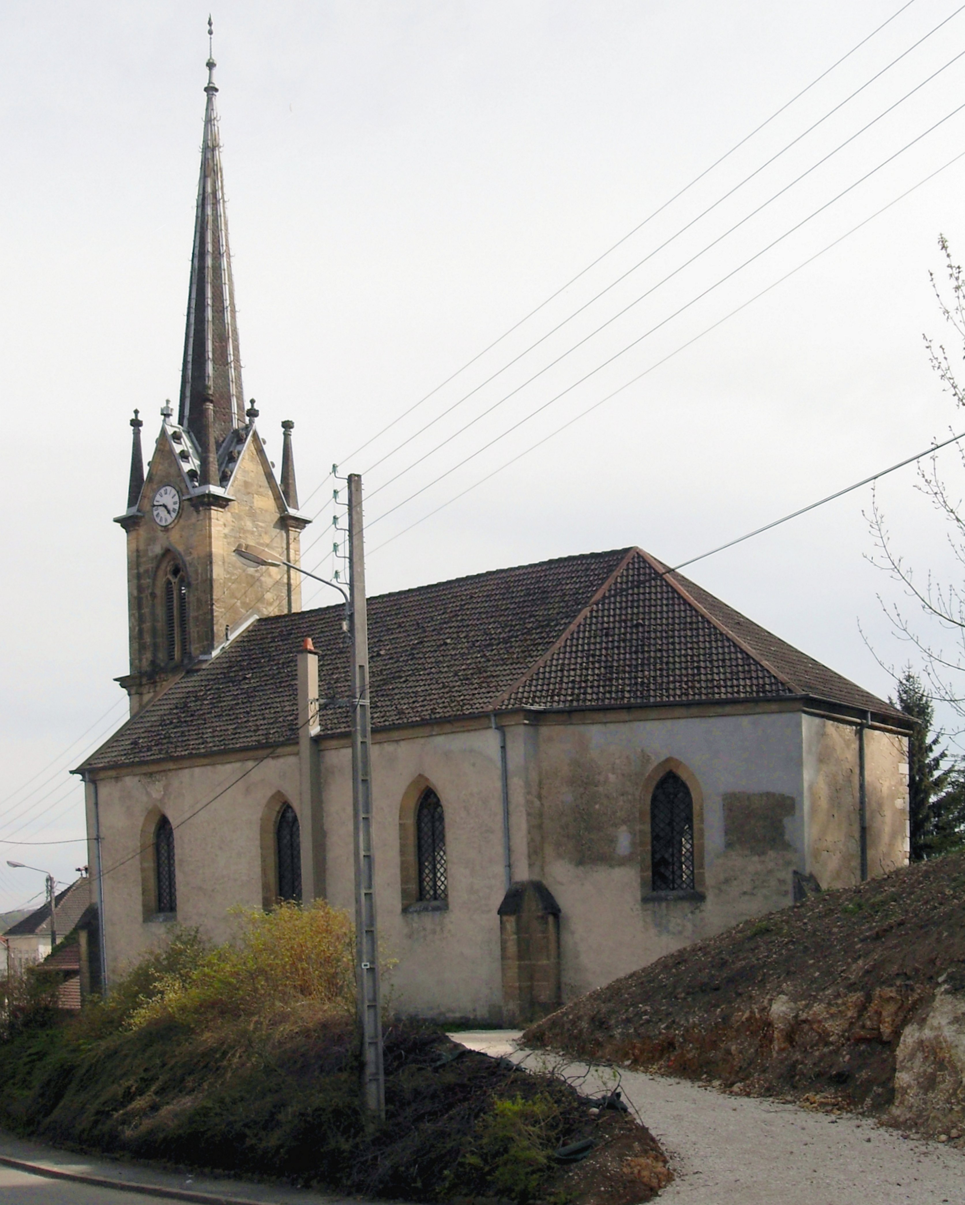 Le temple protestant d'Allenjoie